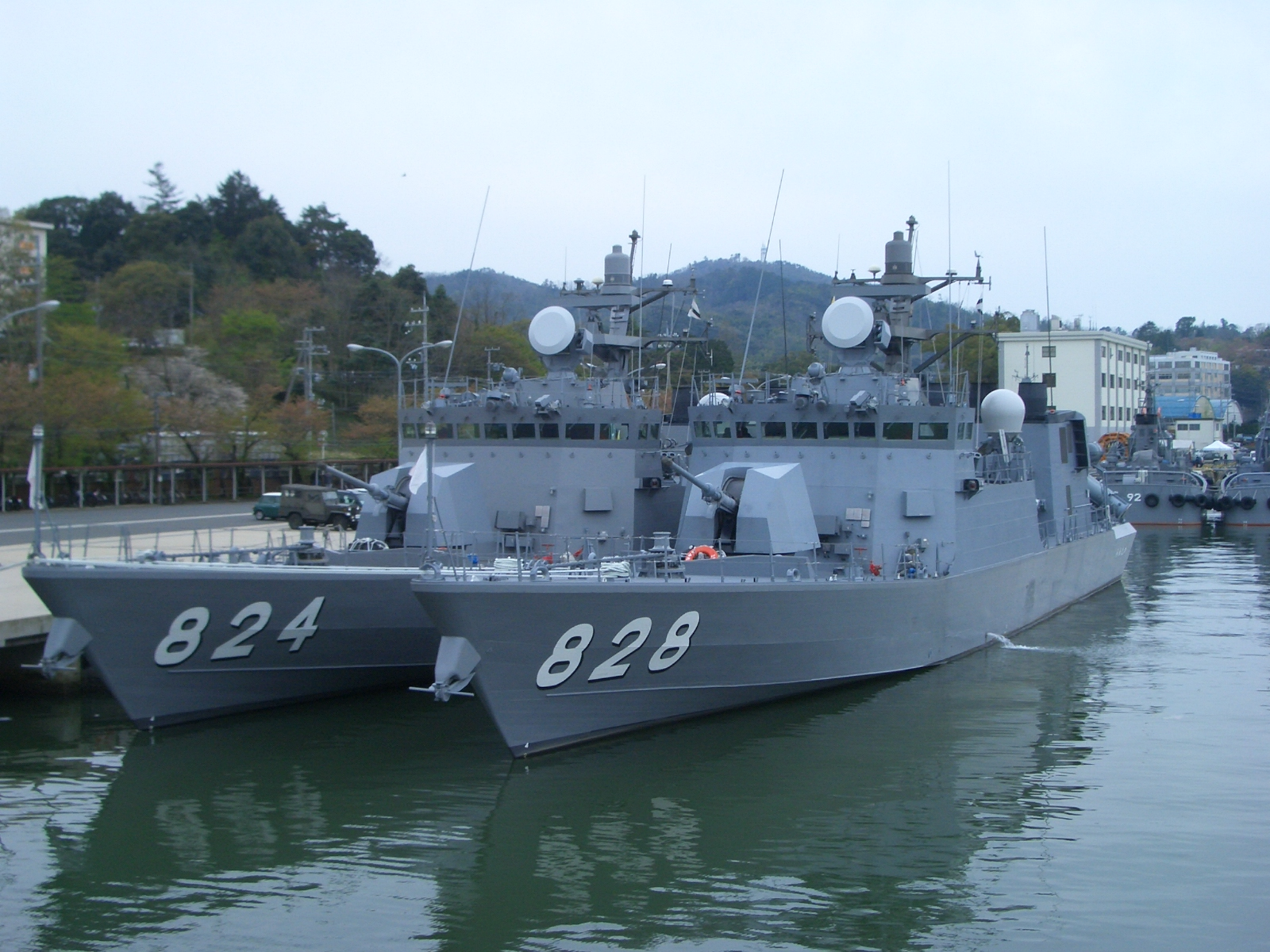 ミサイル艇はやぶさ、同うみたか。その後方には曳船92号が見える。舞鶴・北吸桟橋に繋留中。2006年4月22日撮影。